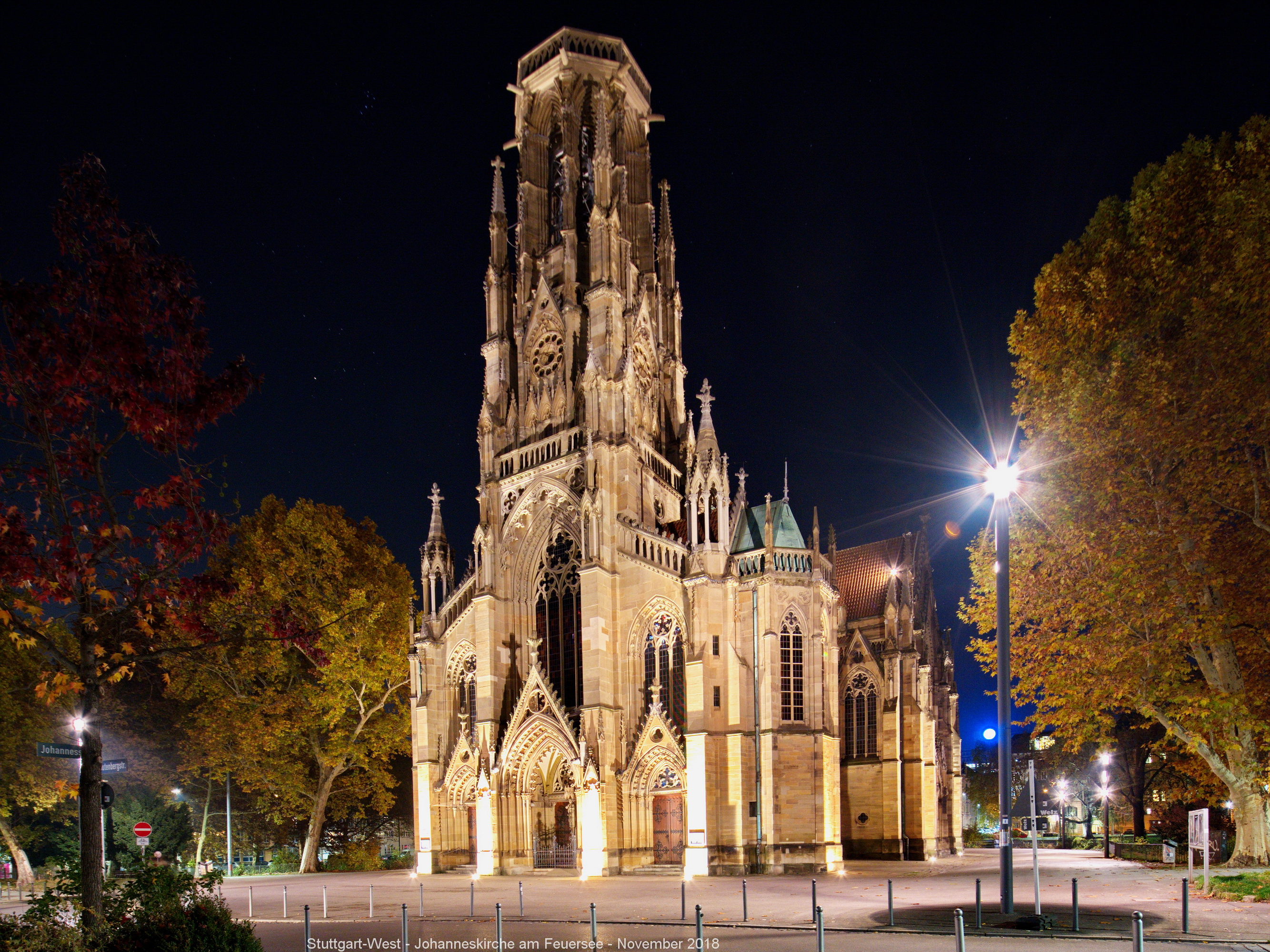 Johanneskirche am Feuersee in Stuttgart-West bei Dunkelheit